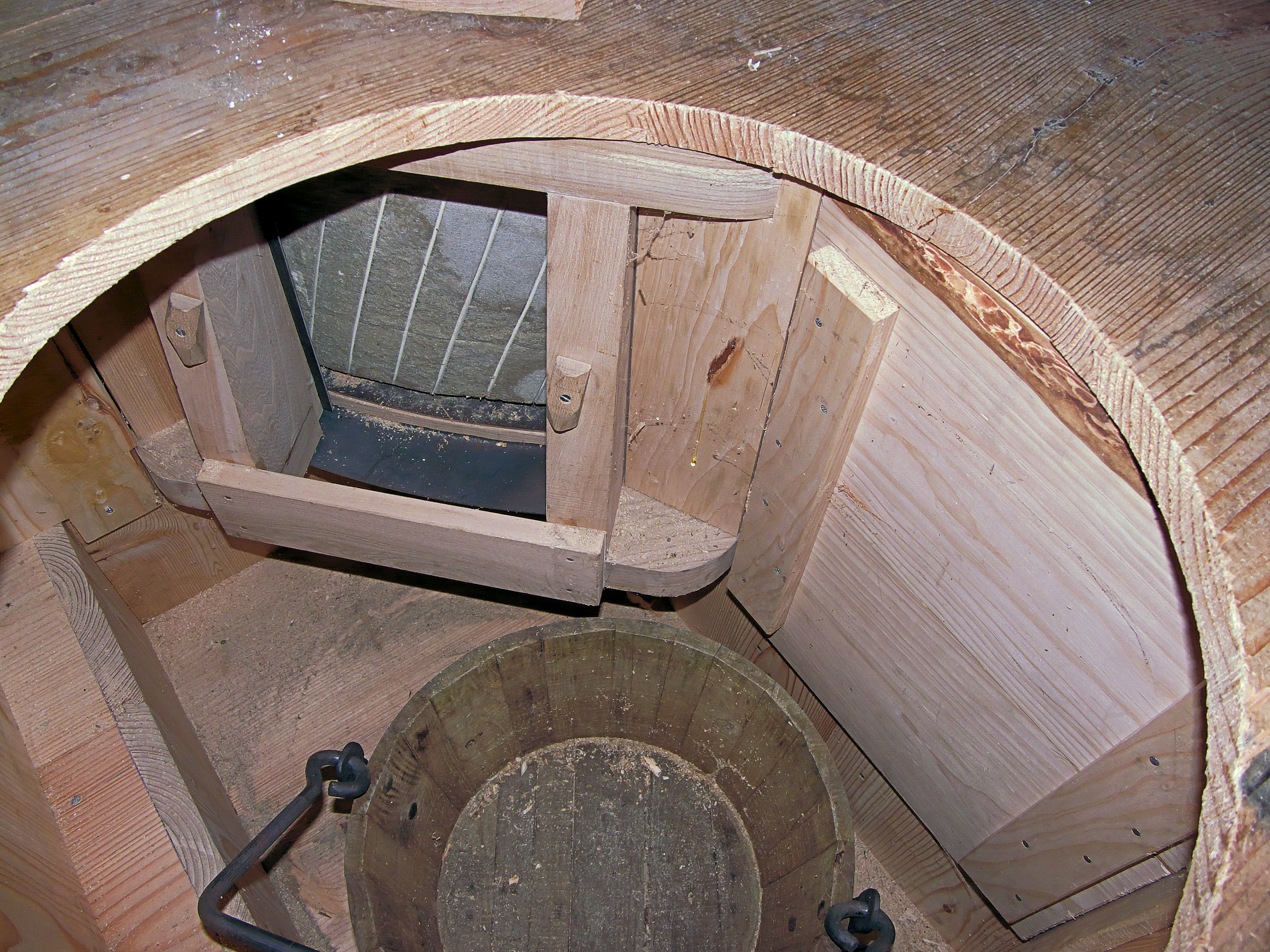 Molen De Koe Ermelo, zijkant pelsteen met schootemmer